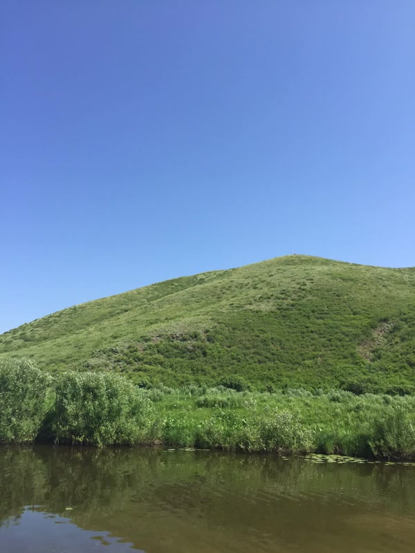 Табиғаты